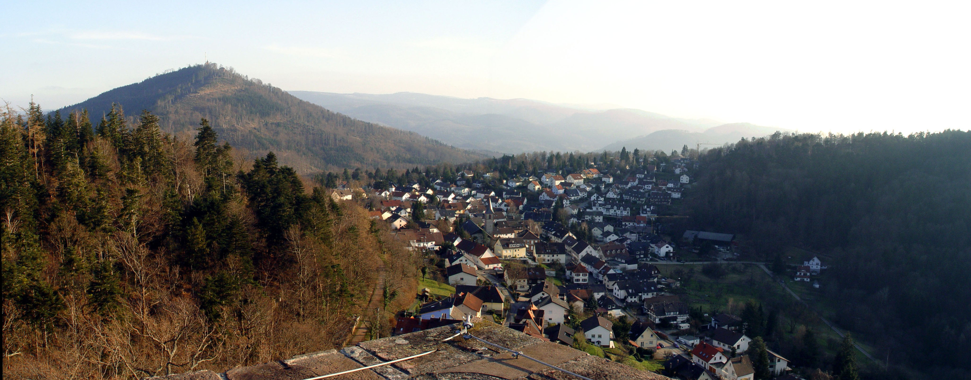 Fotografiert von Martin Dürrschnabel. Blick auf die Gemeinde Ebersteinburg.